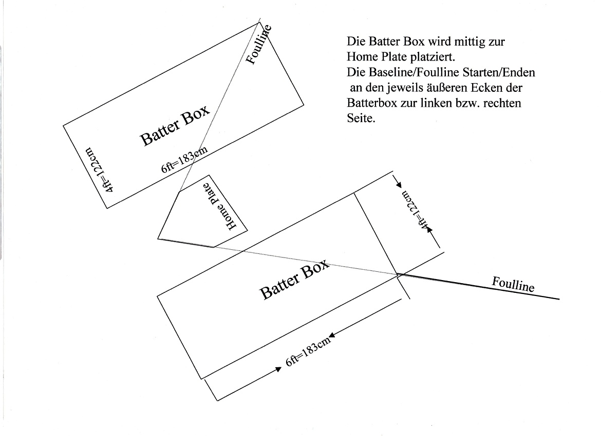 Anlegen der Batter Boxes